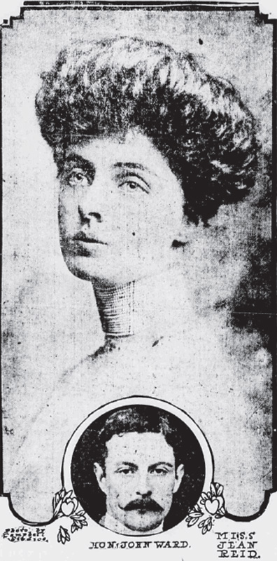 The Reids daughter Jean Reid in 1908